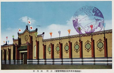 中文（台灣）: 1935年臺灣博覽會明信片--南邦館。